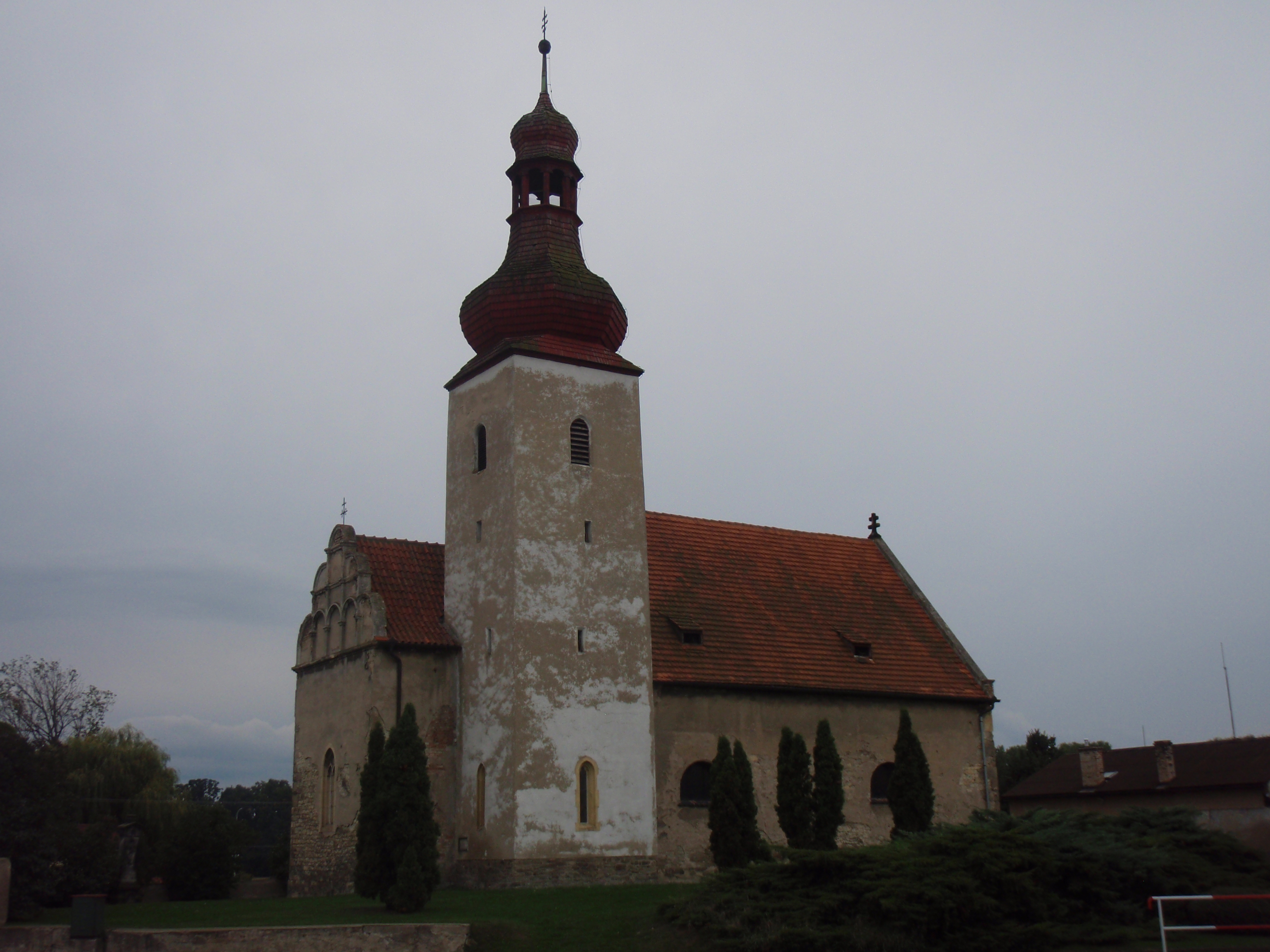 Kostel sv. Matouše (Dobroměřice), Pražská, Dobroměřice